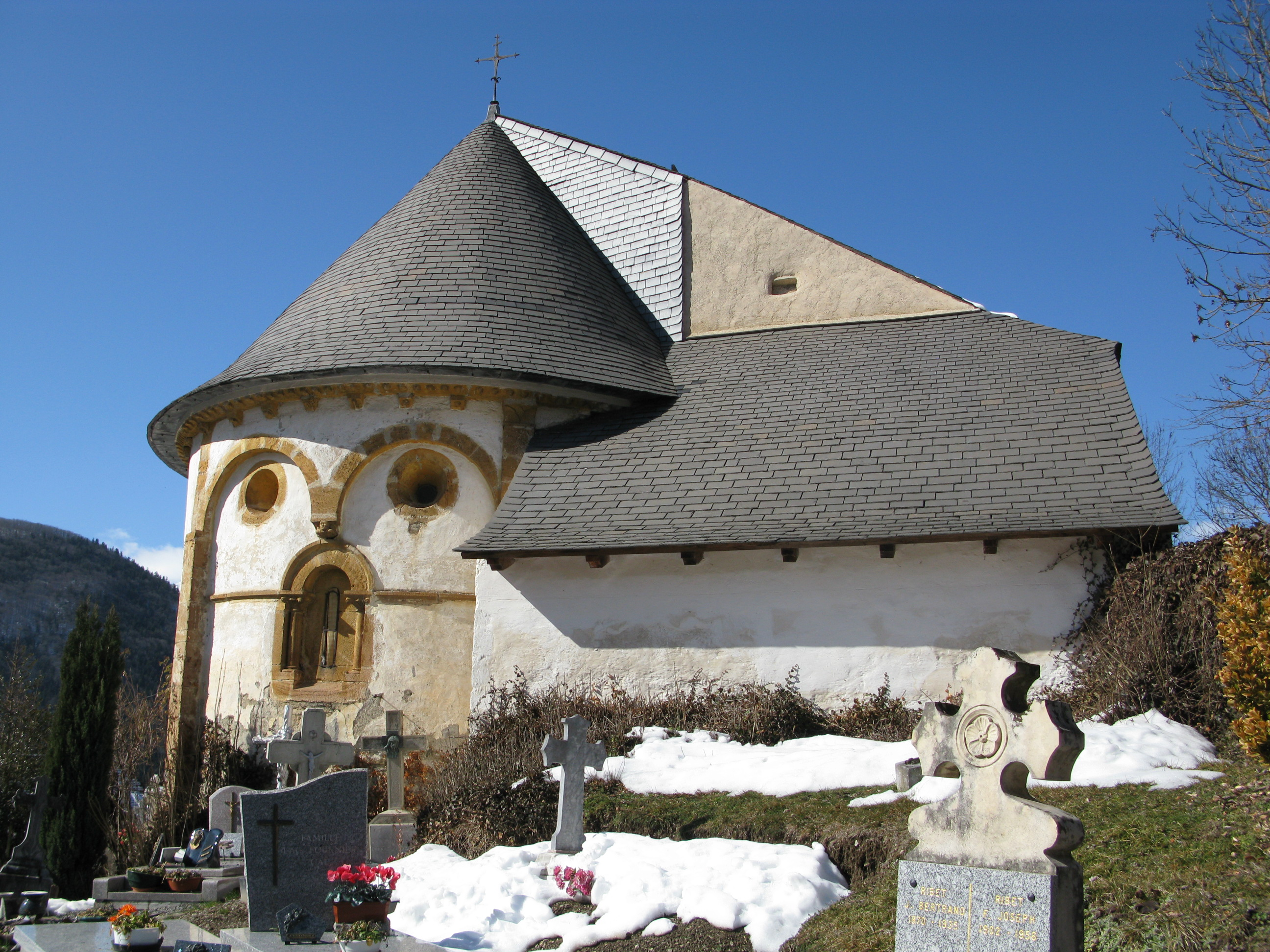 L'église de Jézeau